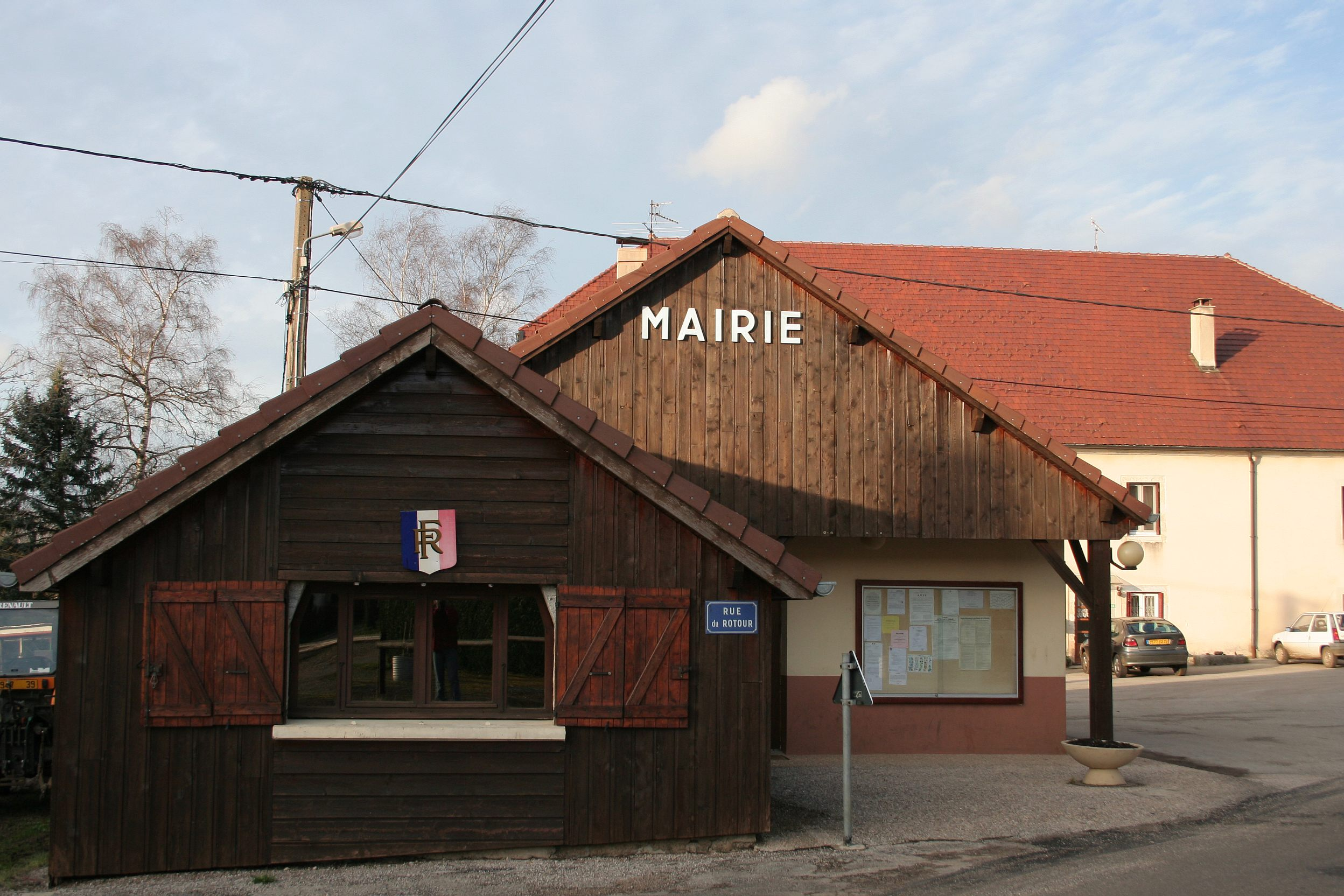 Mairie de Loulle 39 France 3 dec 2006 photo by Jean-François Gaffard Jeffdelonge